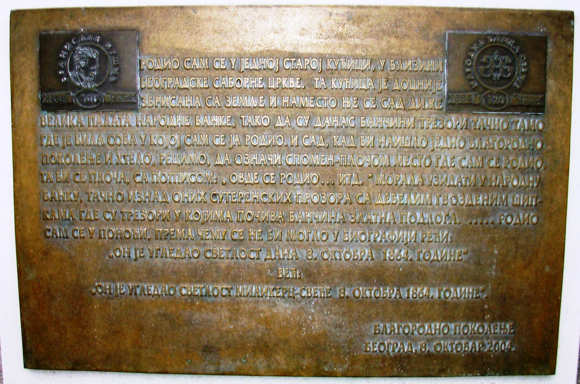 Спомен плоча која се налази на висини од једног метра изнад земље, на зиду Народне банке у улици Краља Петра у Београду. Како каже текст, ту се родио Бранислав Нушић. Сликао Голдфингер.